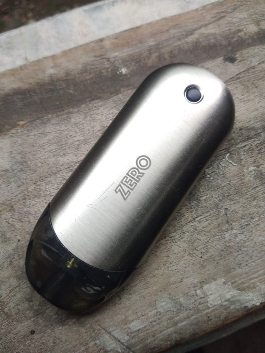 Jawa: rokok elektrik model zero renova